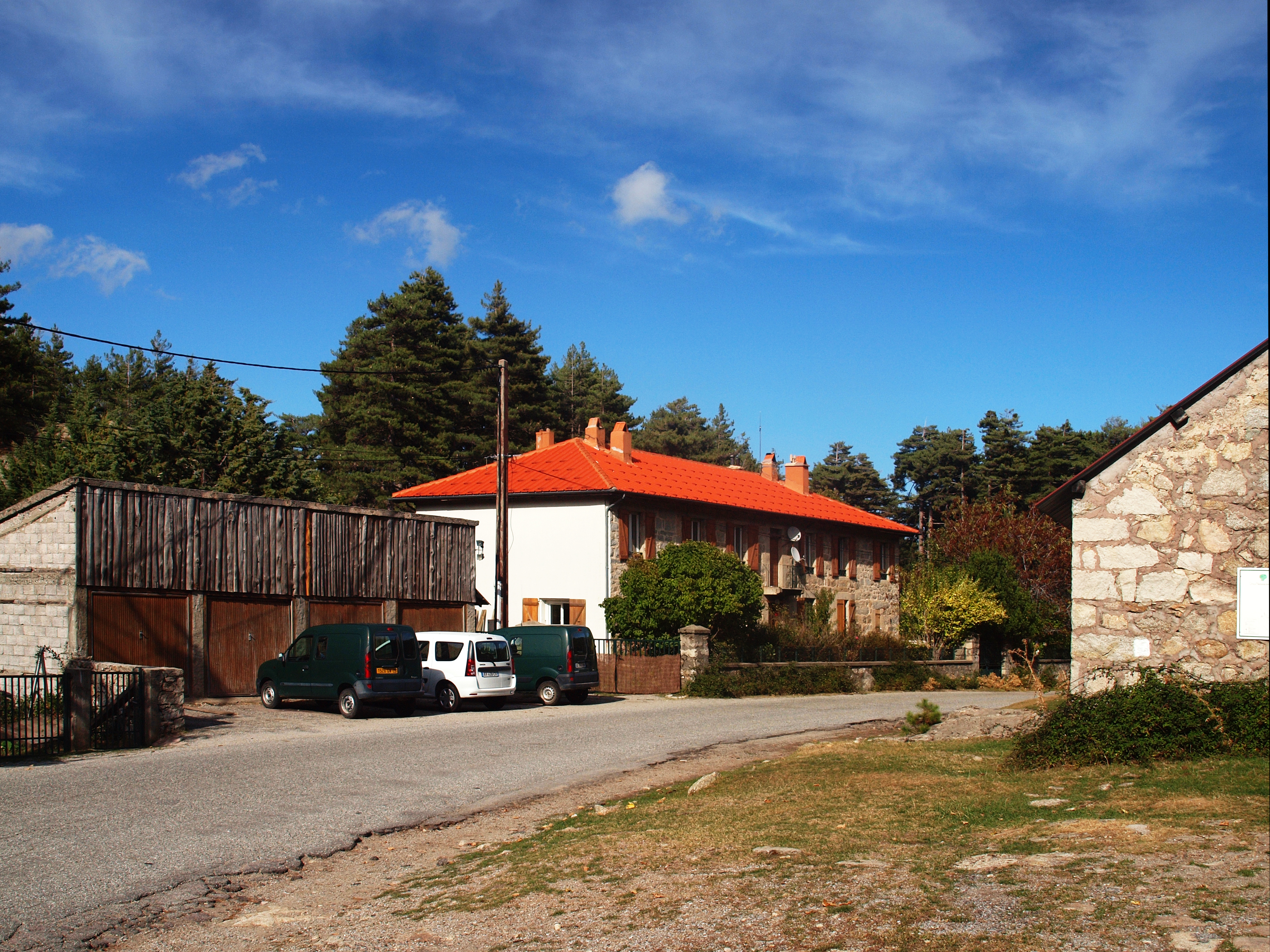 Albrtacce (Corsica) - Maison forestière de Poppaghja dans la forêt de Valdu Niellu